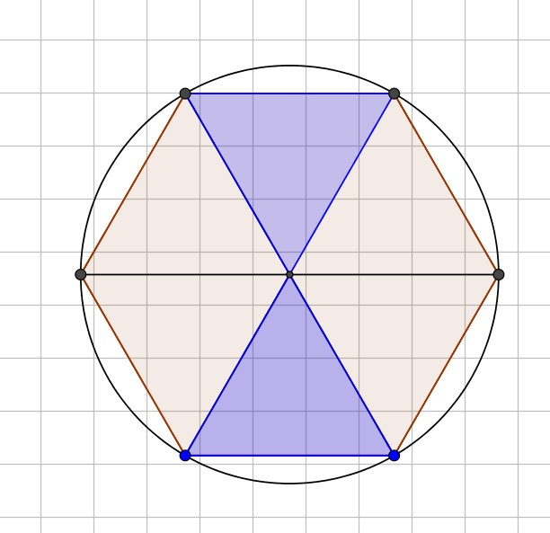 Dibuix amg geogebra d'un cercle amb hexàgon inscrit